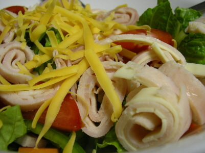 Chef salad